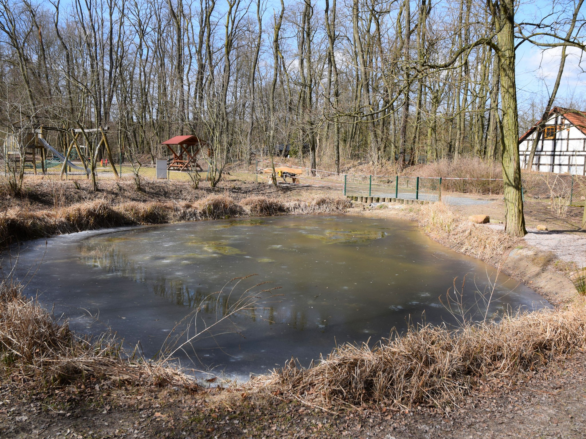 Wildparkteich Frankfurt (Oder)-Rosengarten